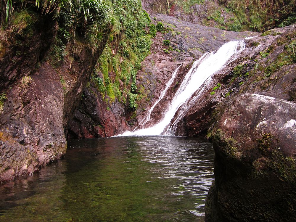 Piscina Natural en Velo de Plta